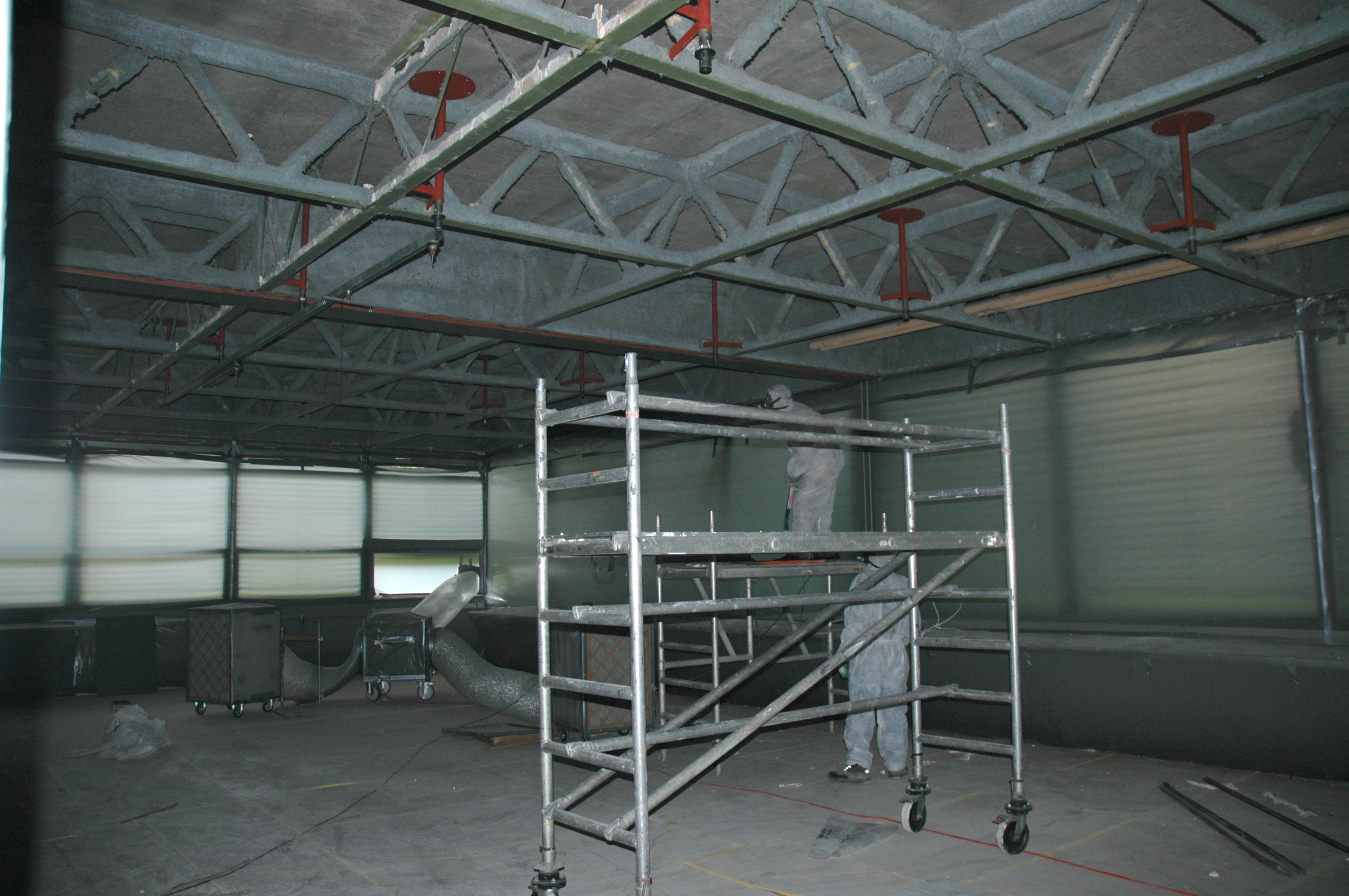 Sanierung einer Stahlträgerkonstruktion, die mit Asbest gegen Brand geschützt wurde.